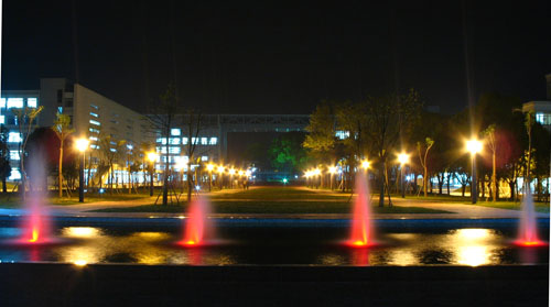 華中農業大學獅子山廣場新貌（2007年後）。